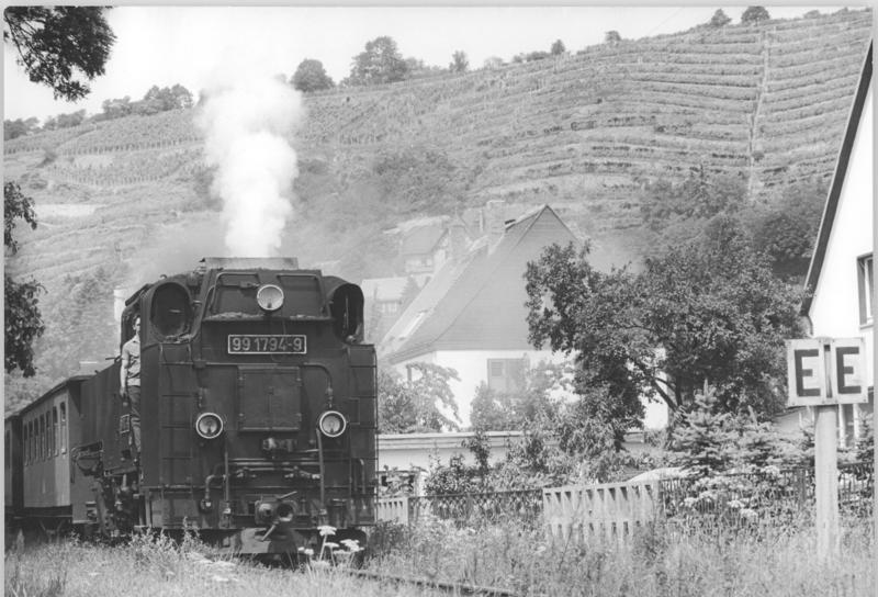 Dampflok 99 1794-9 (BR 99) ADN-ZB Hiekel 14.8.84 Bez. Dresden: Seit 100 Jahren dampft der "Grundwurm" oder "Lößnitzdackel" seine 16,5 km lange Strecke von Radebeul-Ost nach Radeburg. Für die Schmalspurbahn wurde in 14monatiger Bauzeit 39 256 Meter Stahlschienen und 22 651 Holzschwellen verlegt. Heute verkehren täglich acht Personen- und zwei Güterzüge in beiden Richtungen, vorbei an den Weinhängen der Lößnitz (Foto) durch den gleichnamigen Grund.